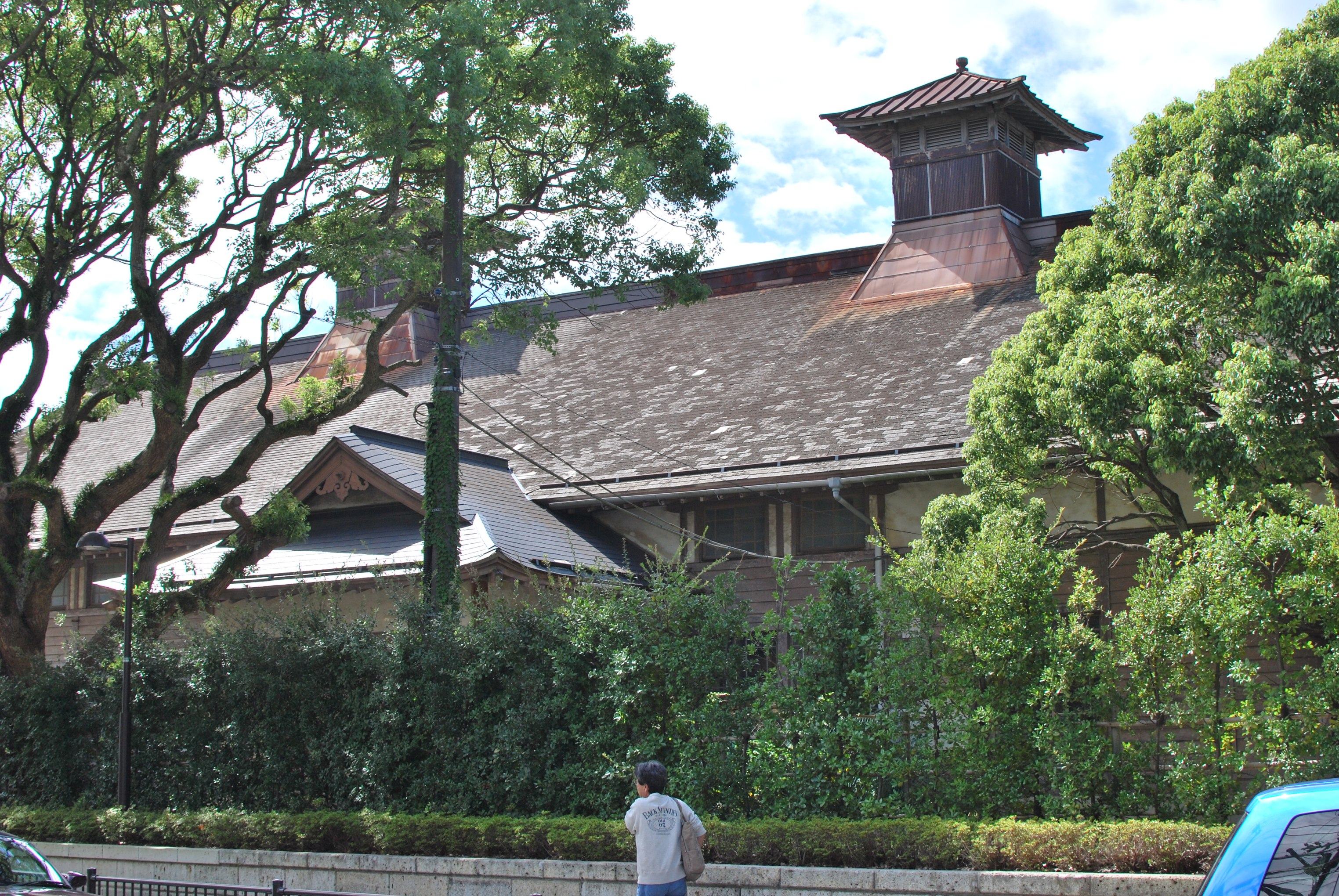 鎌倉市立御成小学校の旧講堂。